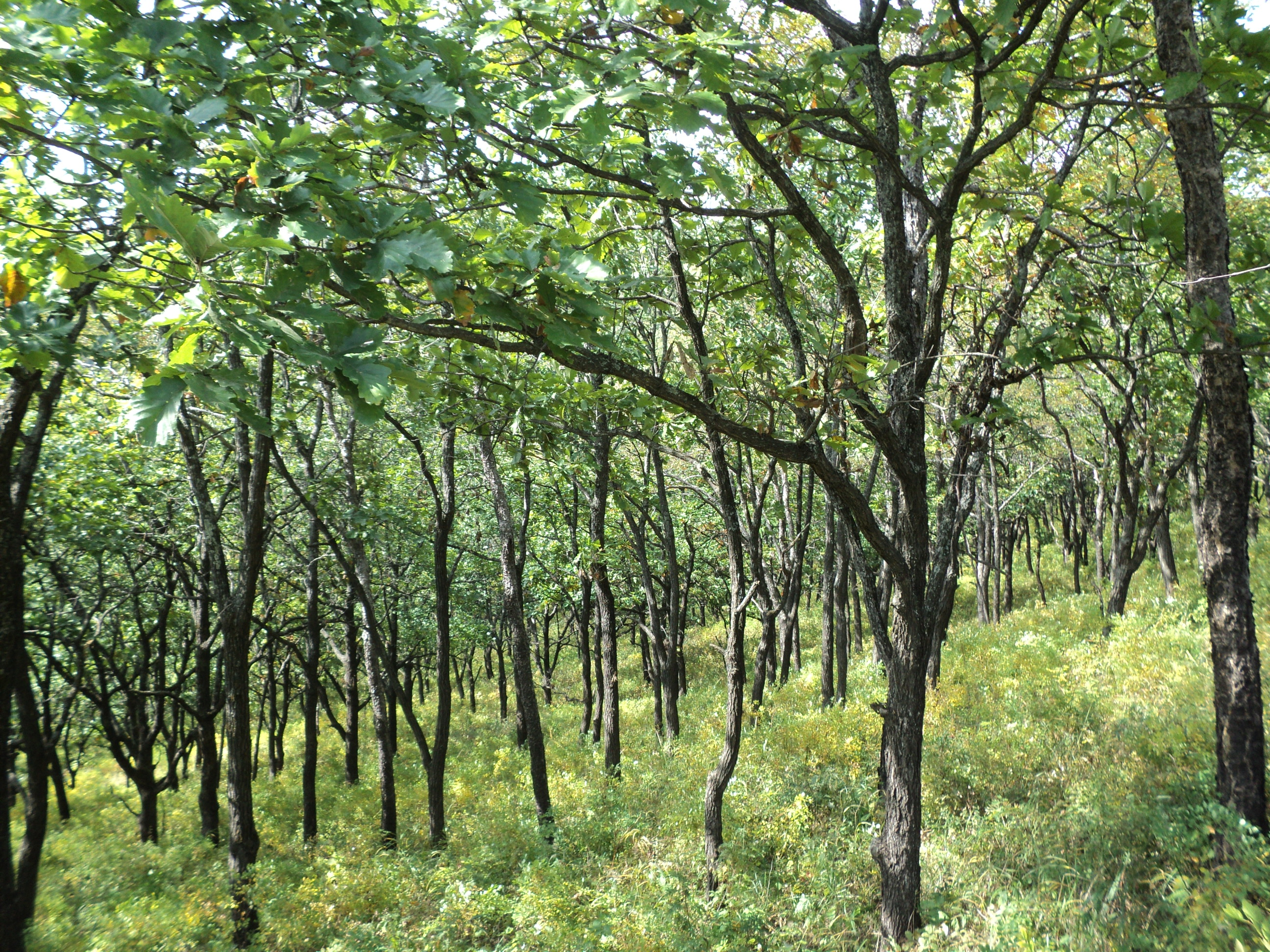 Дубовый лес на окраине Находки